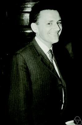 Foto di Andrzej Hulanicki